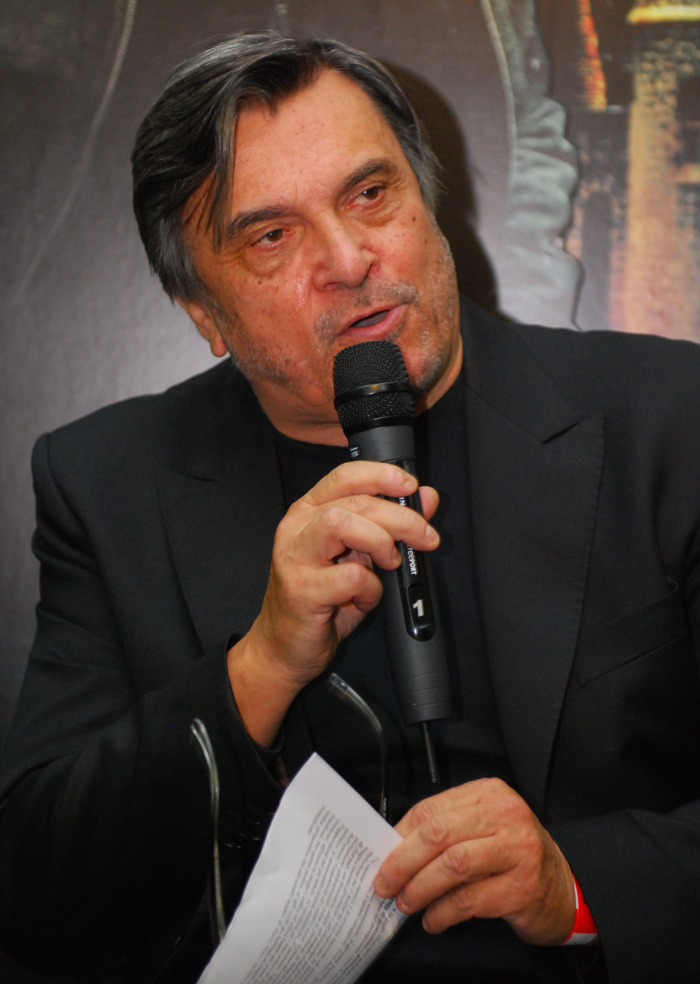 Il critico cinematografico Pino Farinotti a Lucca Comics and Games 2011 per l'evento speciale con i "gemelli Weasley" per la presentazione dell'edizione DVD/Blu-ray di Harry Potter e i Doni della Morte.